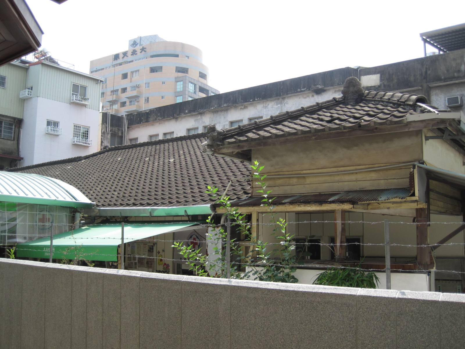 中文（台灣）: 台南愛國婦人會館後棟（紅十字會臺南支會）